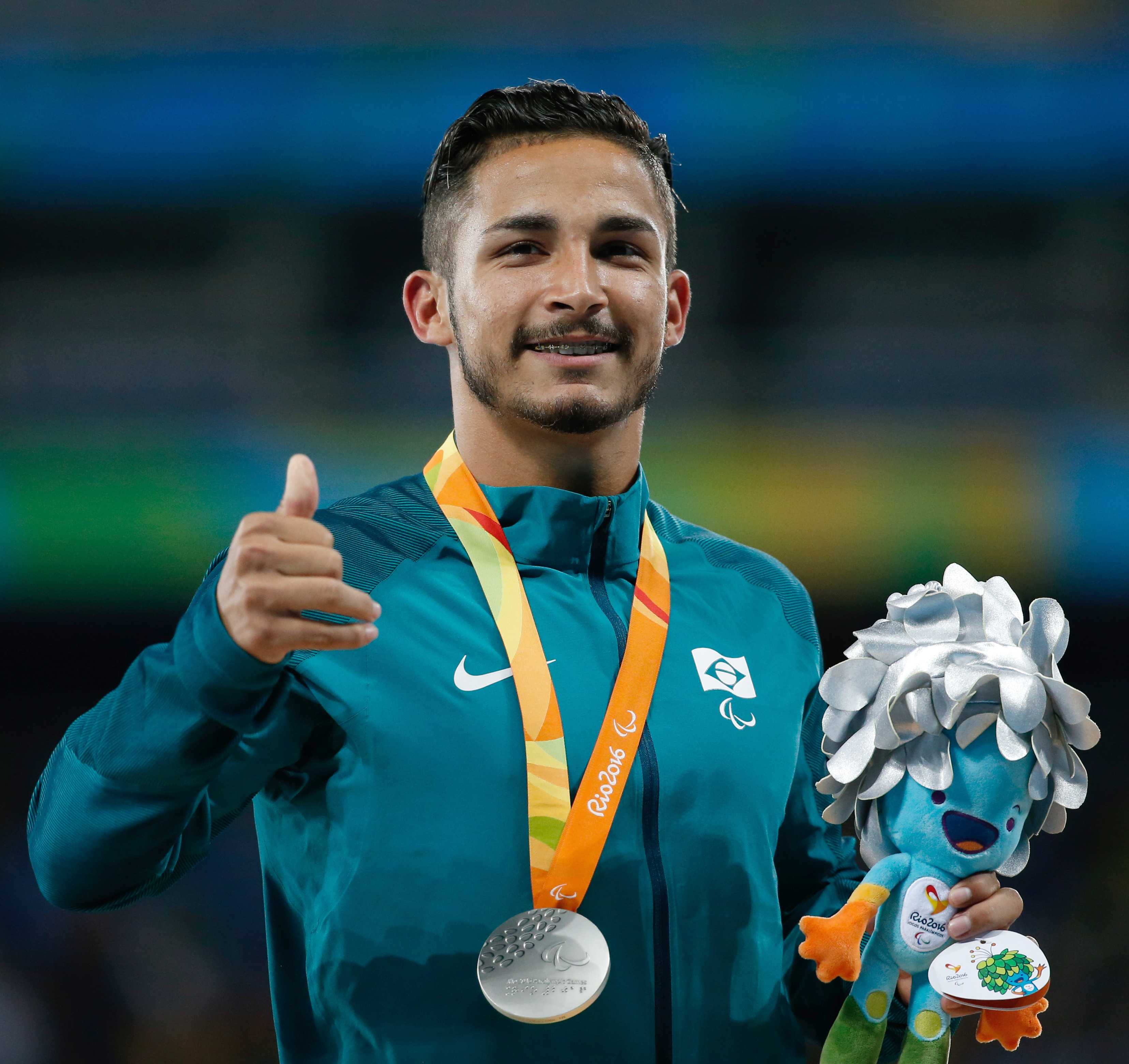 Rio de Janeiro - Brasileiro Fabio da Silva Bordignon leva medalha de prata nos 100m T35 nos Jogos Paralímpicos Rio 2016, no Estádio Olímpico